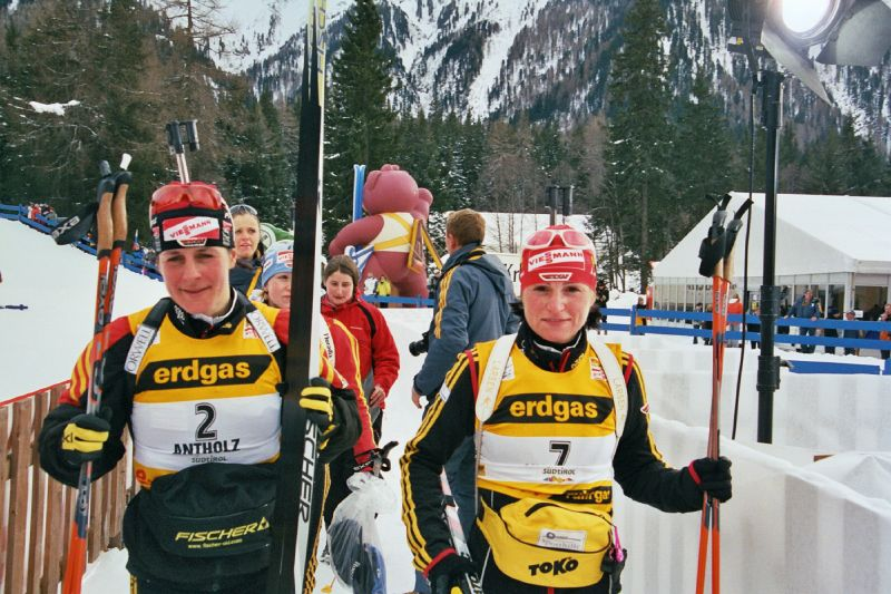 Uschi Diesl, Martina Glagow (versteckt), Andrea HenkelBiathlon_WC_Antholz_2006_01_Film5_MassenDamen_1A